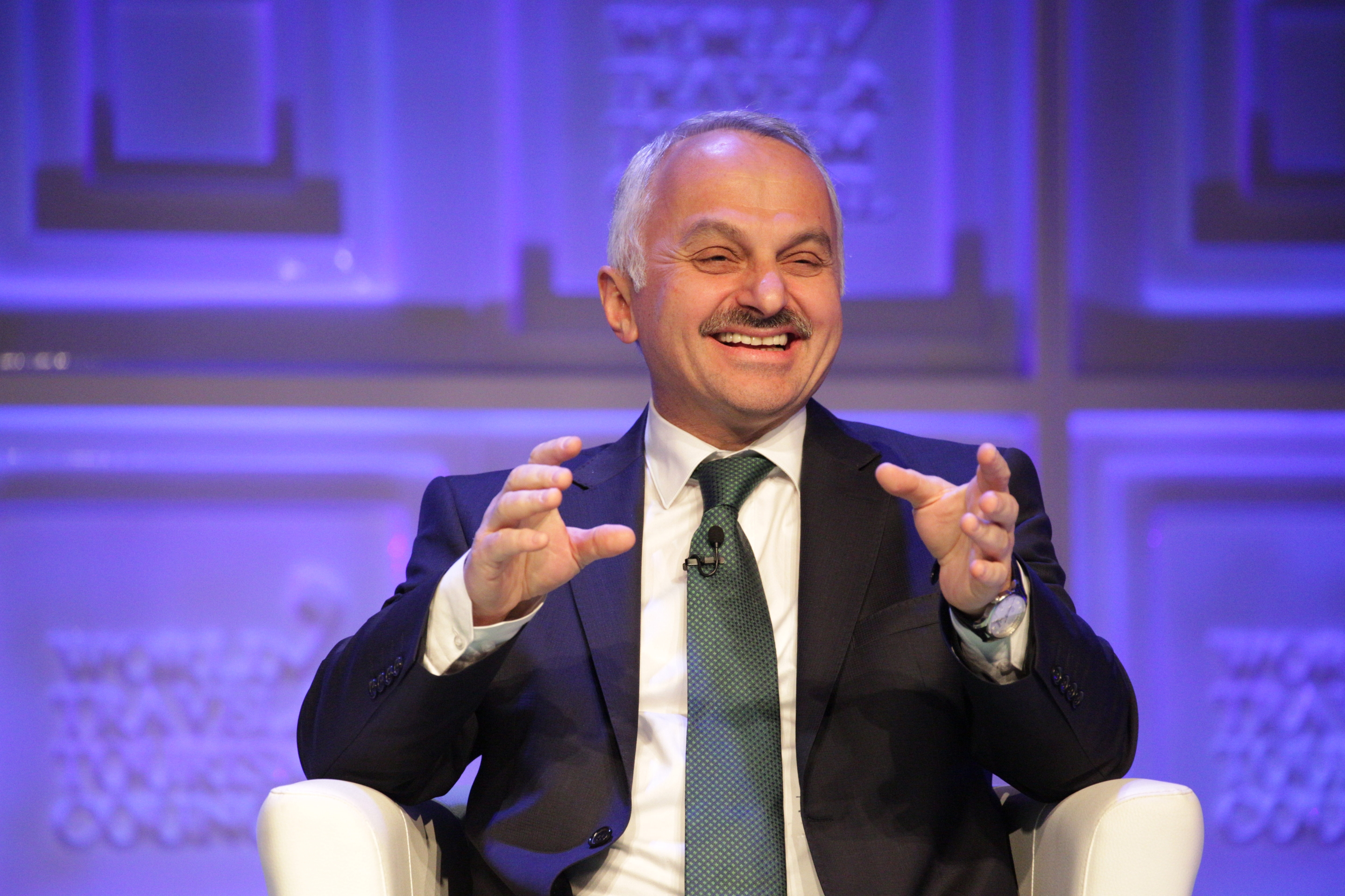 Temel Kotil at WTTC Global Summit 2015